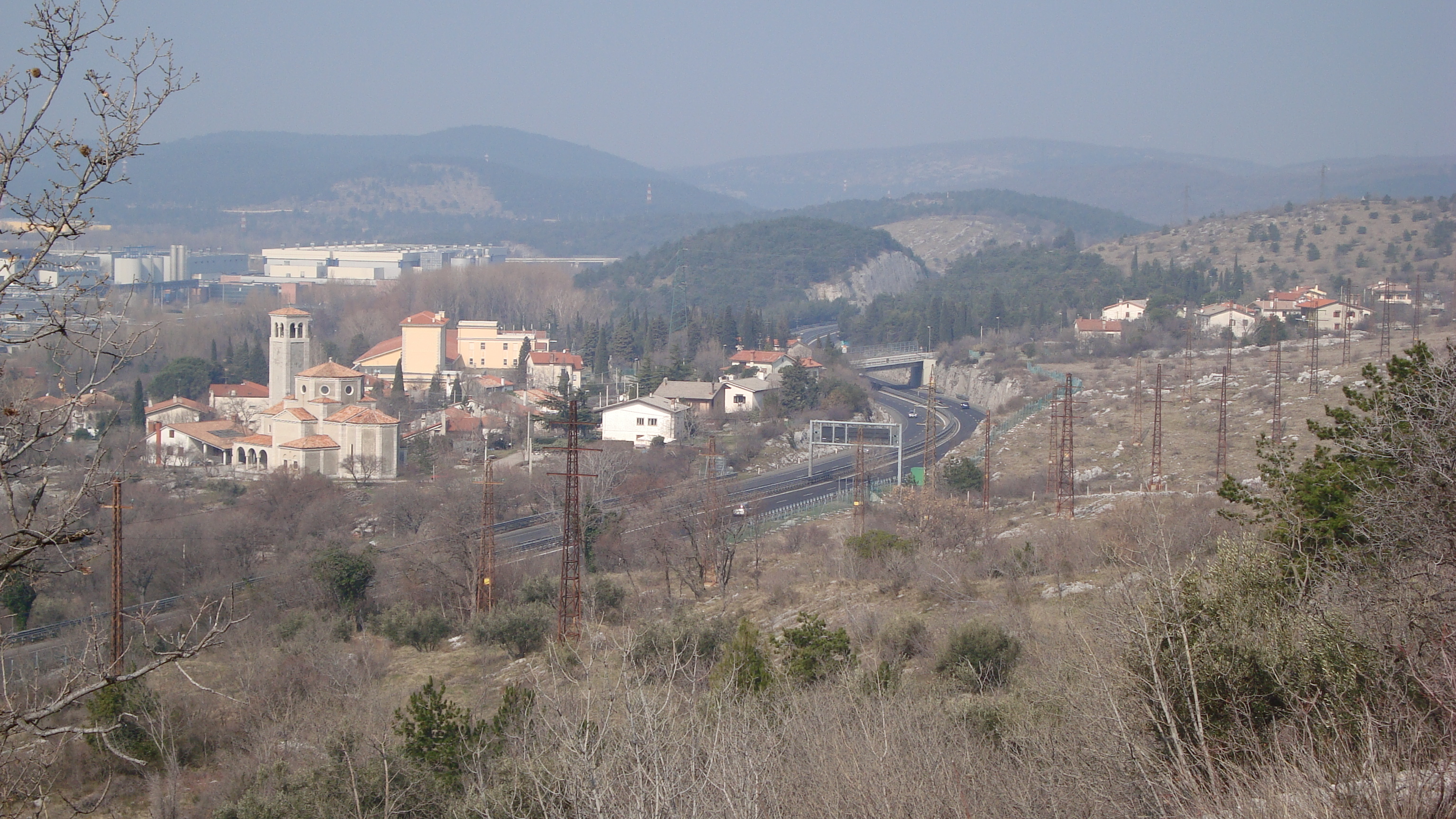 Vista di San Giovanni di Duino dalle pendici del Monte Ernada